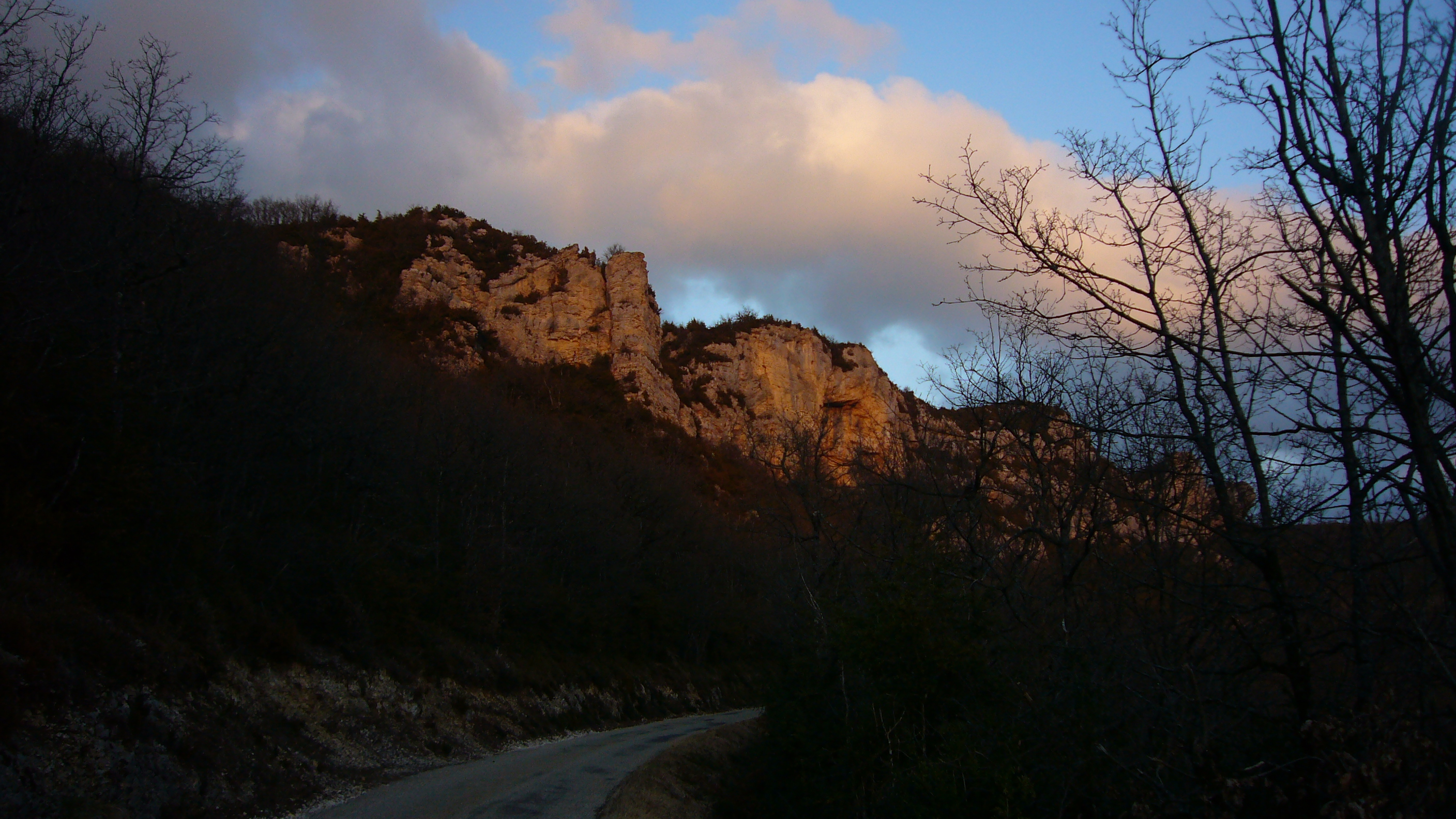 Vue du massif d'Evosges près du village d'Oncieu (01230 - Ain) depuis la route départementale D102